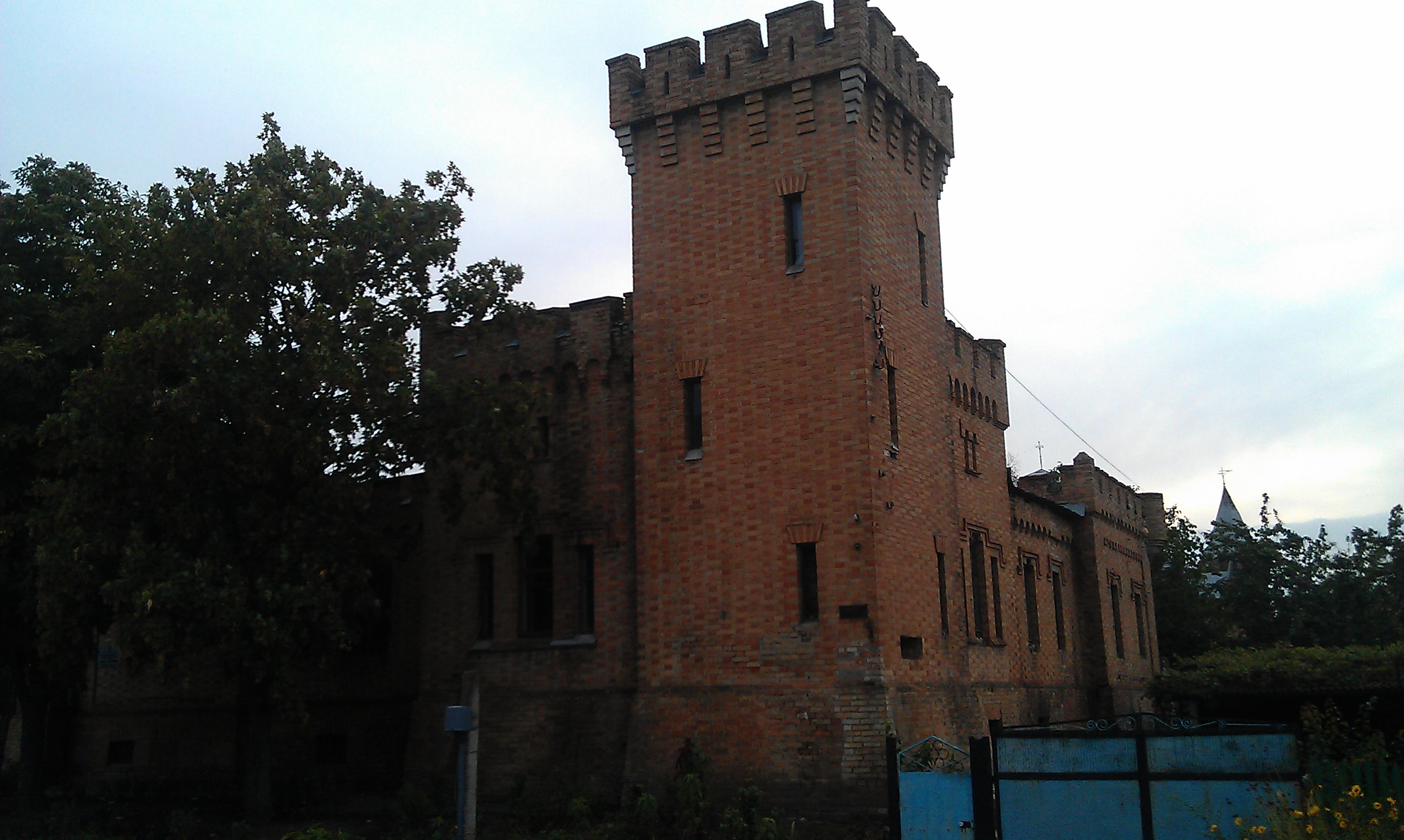 Флігель № 3, Василівка, вул. Гагаріна